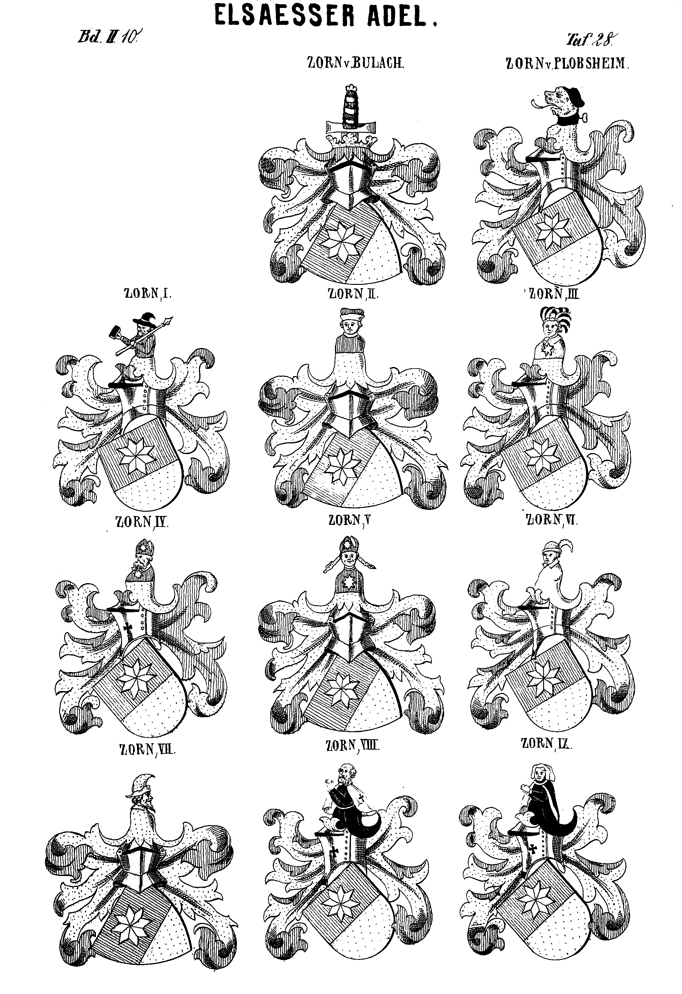 Wappen derer von Zorn